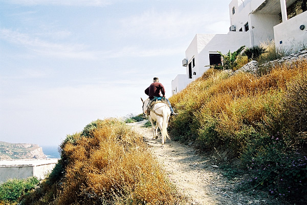 Titel: Man op ezel (Kastro) Locatie: Sifnos, Griekenland Datum: mei 2003 Fotograaf: Gebruiker:IMFJ